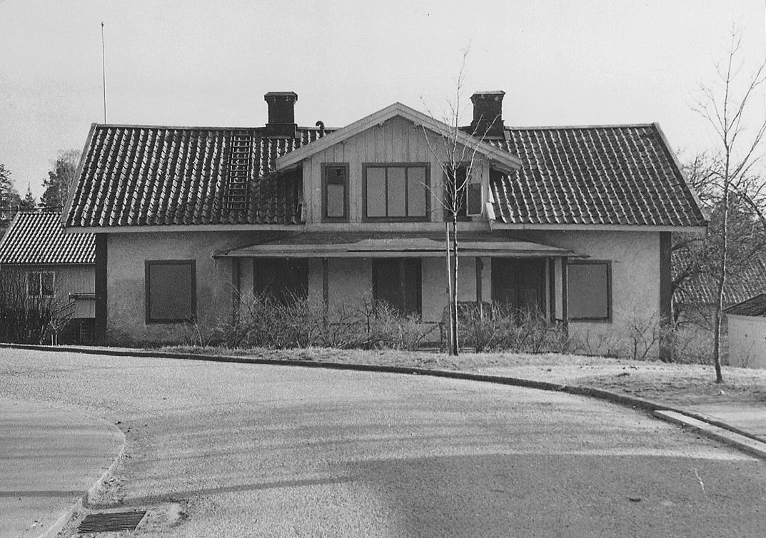 Eklundska gården, vy från Pirogvägen